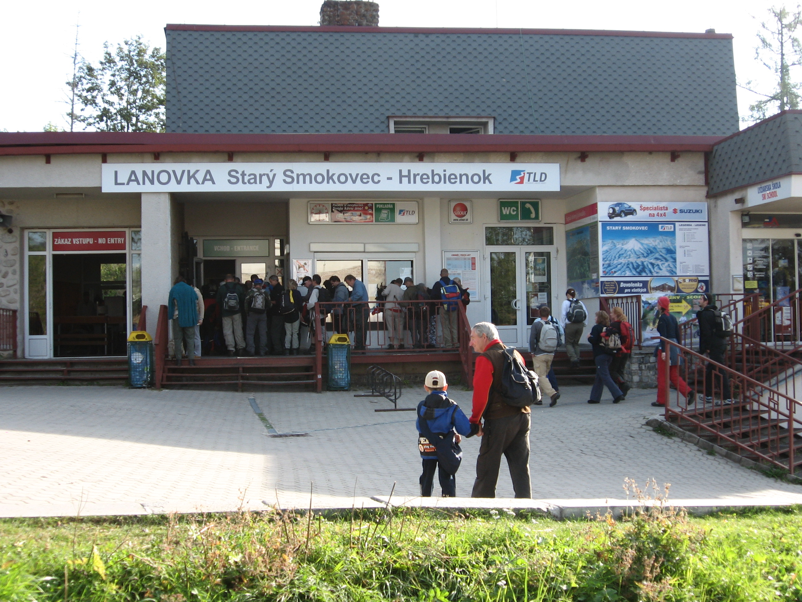 Tatranská osada Starý Smokovec - vstup na lanovku na Hrebienok